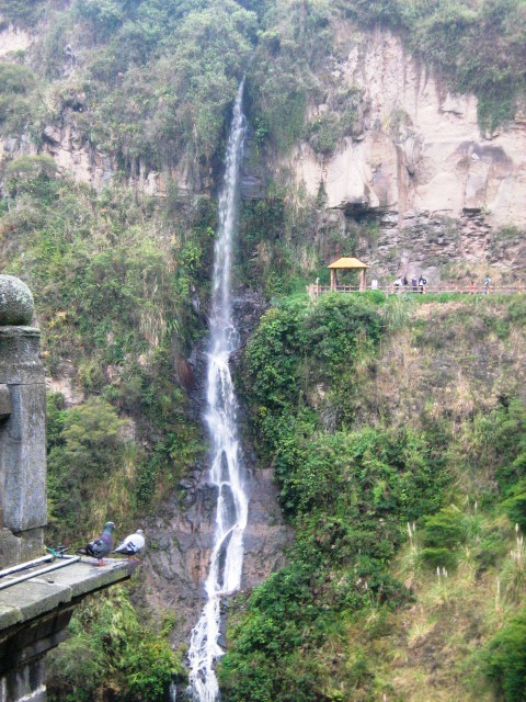 Cascada del Santuario de las Lajas